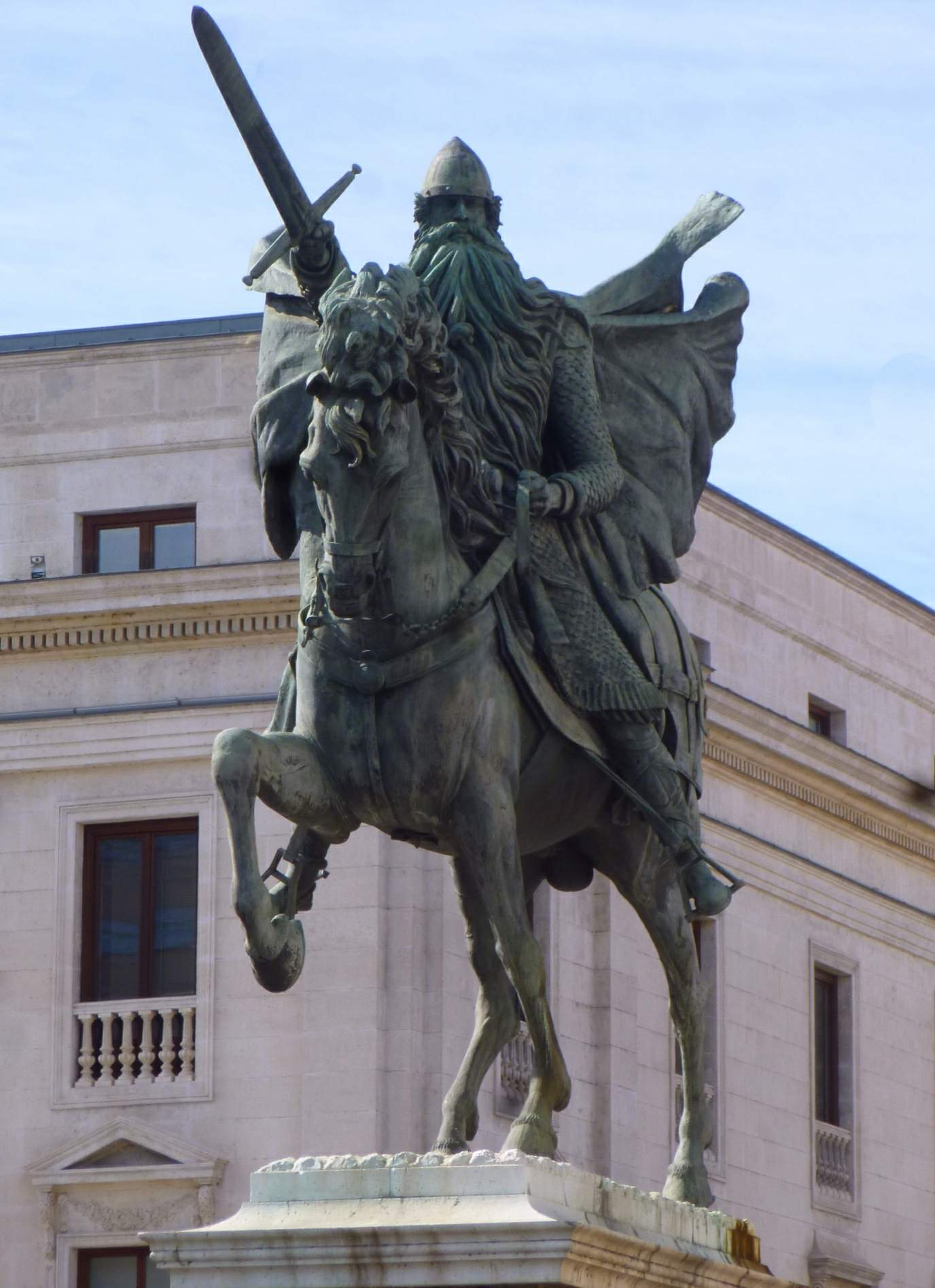 Burgos - Estatua del Cid